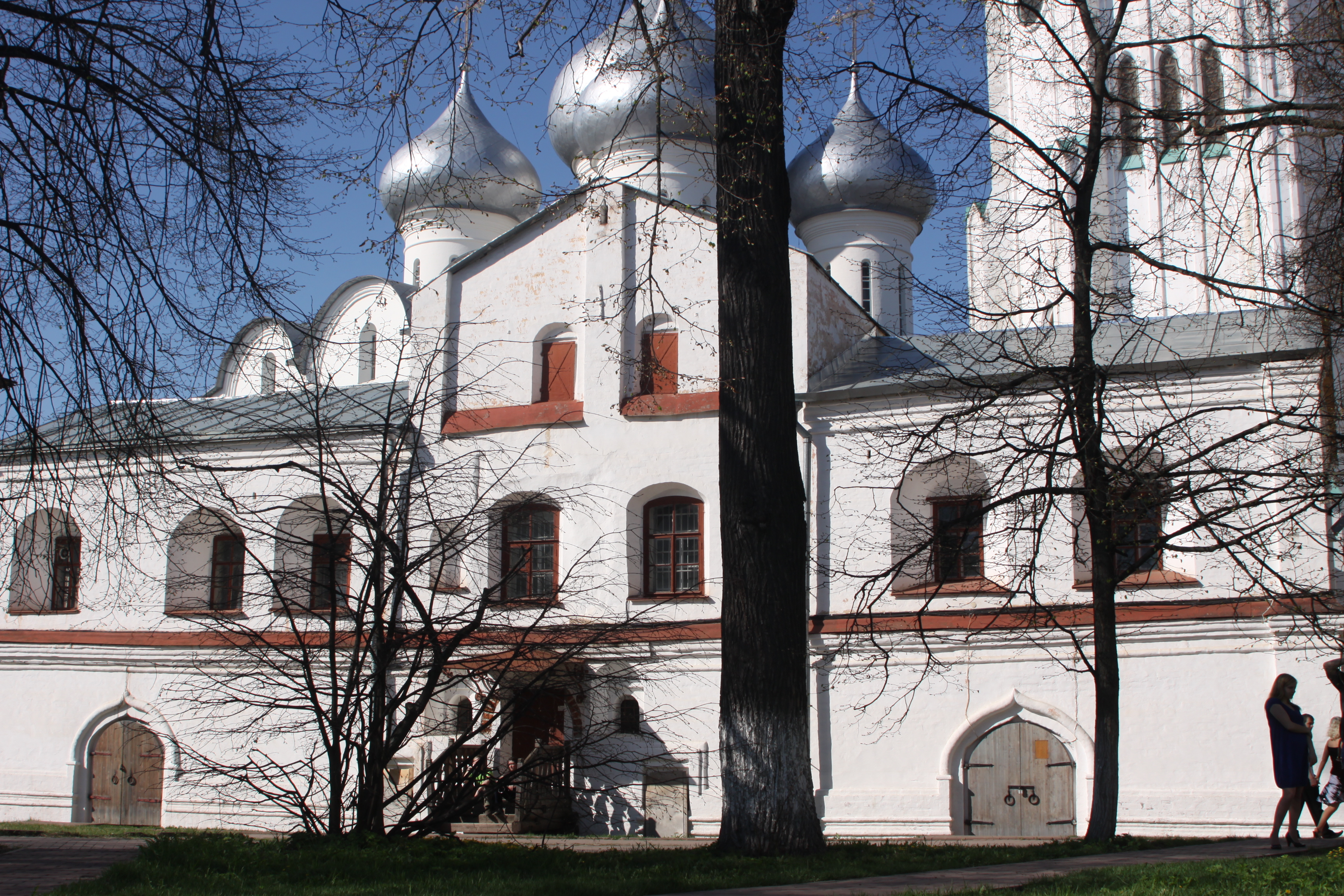 Экономский корпус Вологодского архиерейского двора